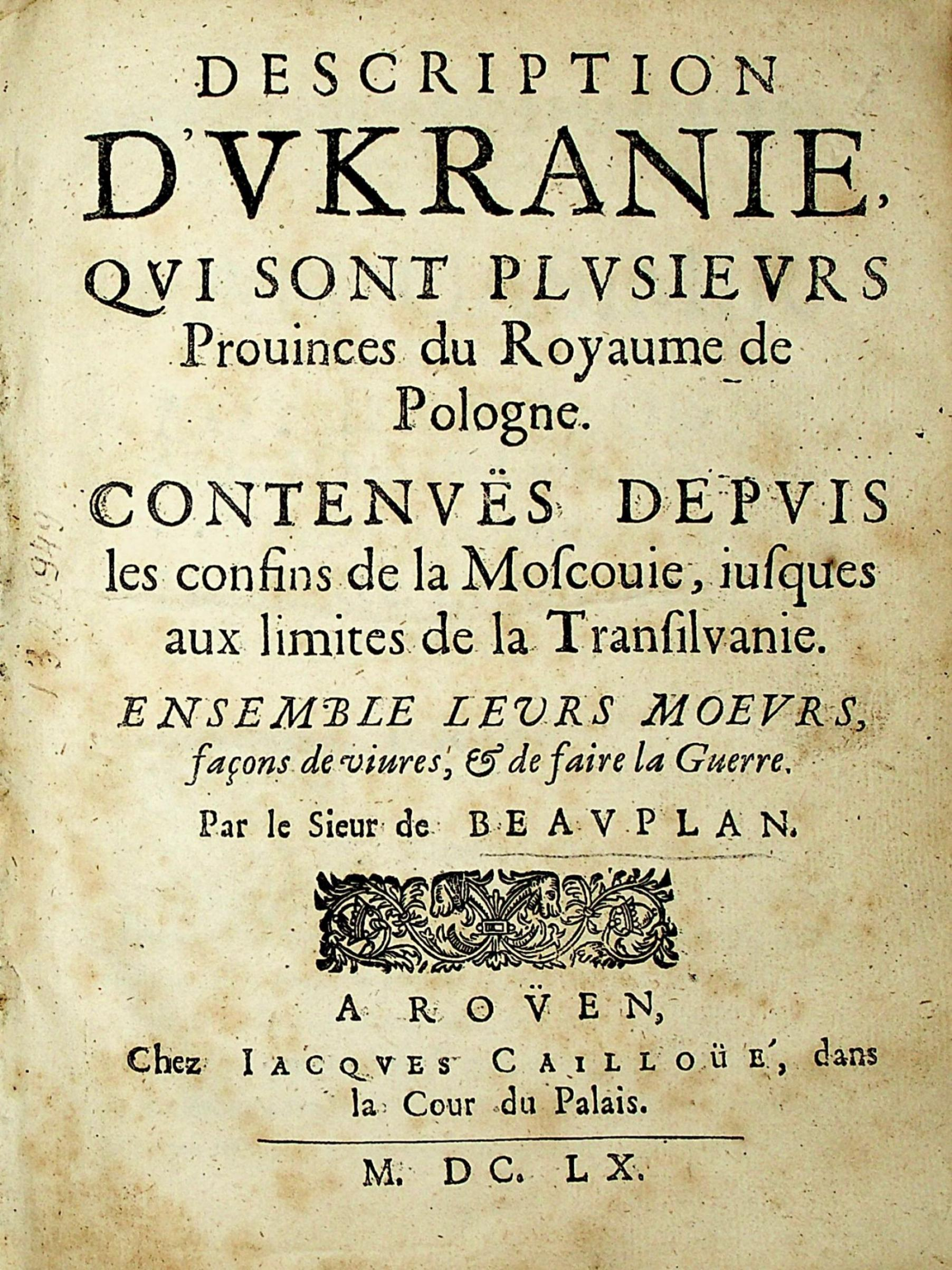 Front page of "Description d'Ukranie" by French Engineer and cartographer Guillaume Le Vasseur de Beauplan